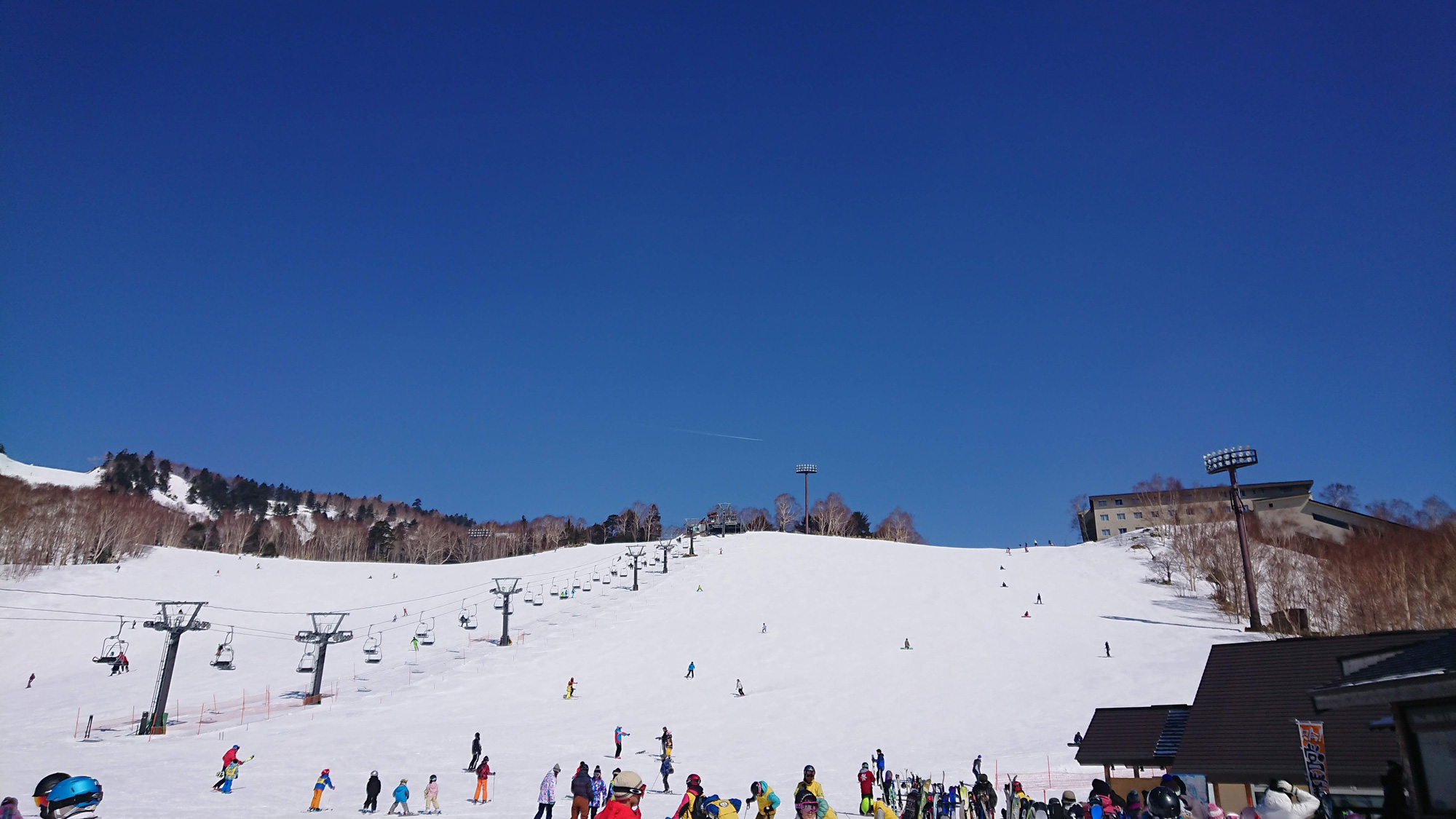 万座温泉スキー場 プリンスゲレンデ 右手奥は万座プリンスホテル 2019/03撮影